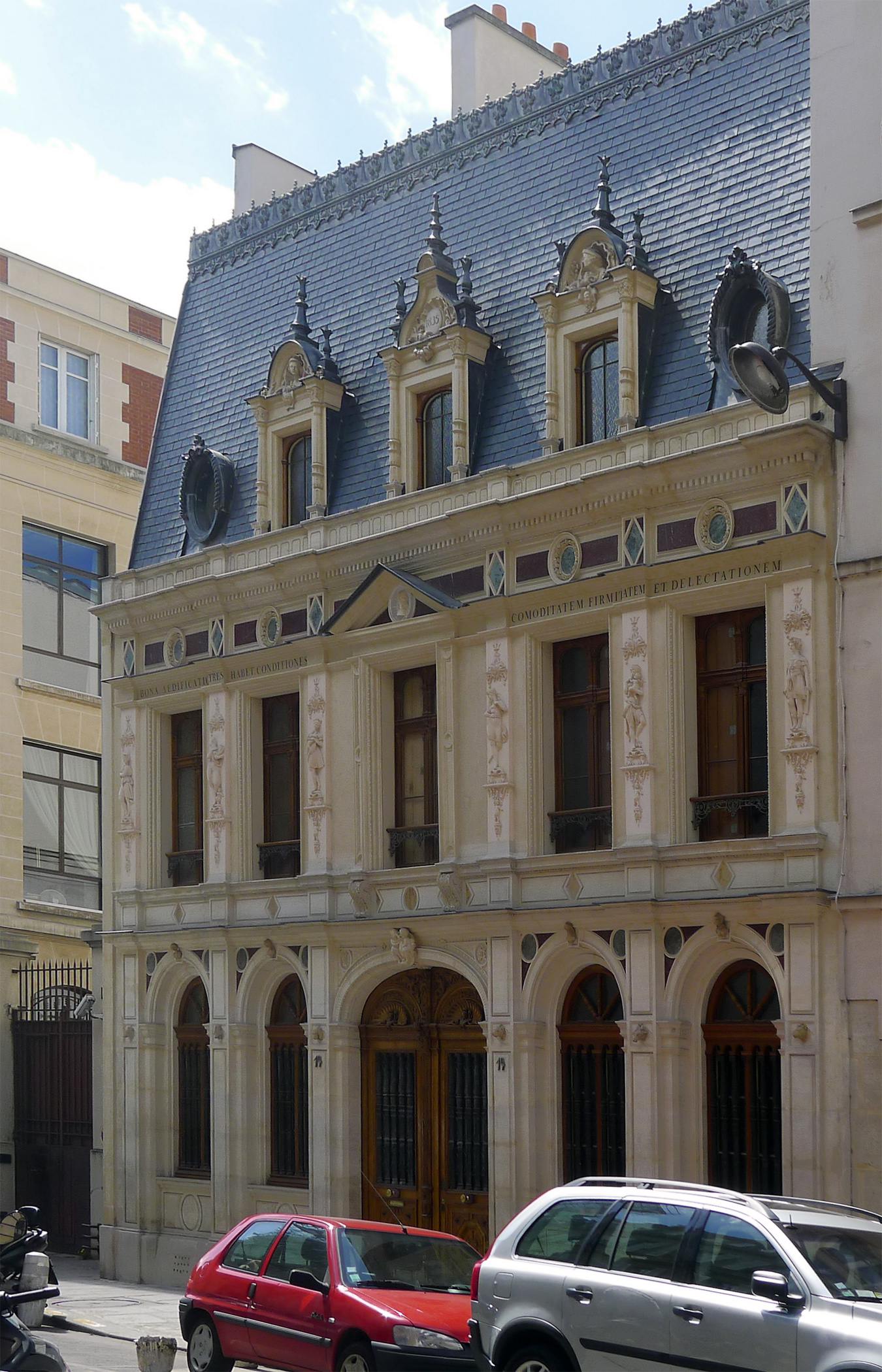 Rue Vaneau (n°14) - Paris VII Immeuble construit en 1835 par l'architecte Pierre-Charles Dusillon et le sculpteur Molknecht. Sur la façade médaillon de l'architecte de la Renaissance Philibert Delorme et inscription "comoditatem, firmitatem et delectationem".